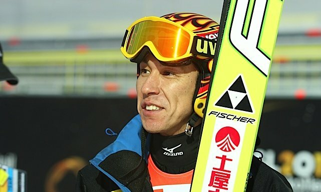 Noriaki Kasai podczas serii treningowej przed konkursem indywidualnym mężczyzn na Mistrzostwach Świata w Narciarstwie Klasycznym 2011 w Oslo.